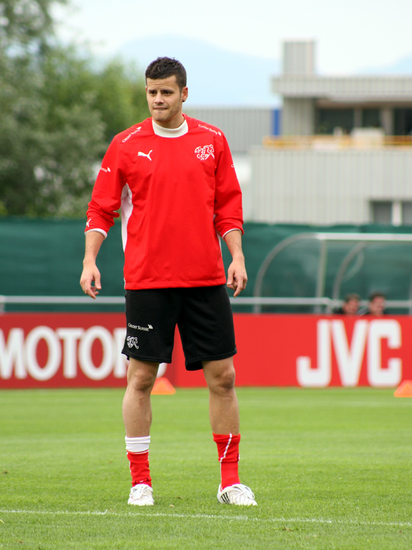 Tranquillo Barnetta im Trainingslager der Schweizer Fussballnationalmannschaft vor der Euro 2008